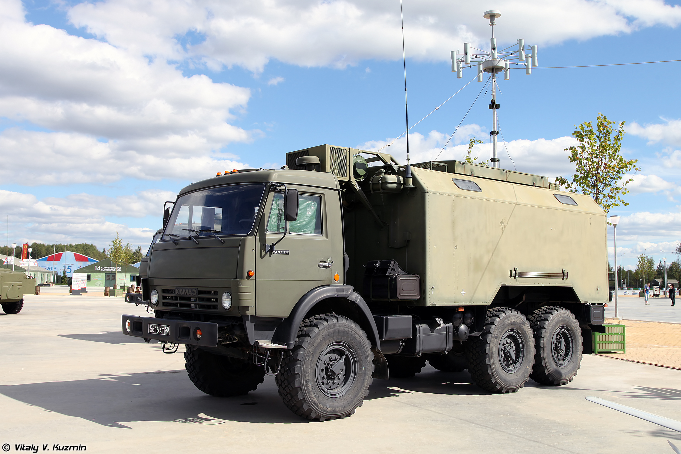 Станция помех Р-330Ж Житель (R-330Zh Zhitel jammer)